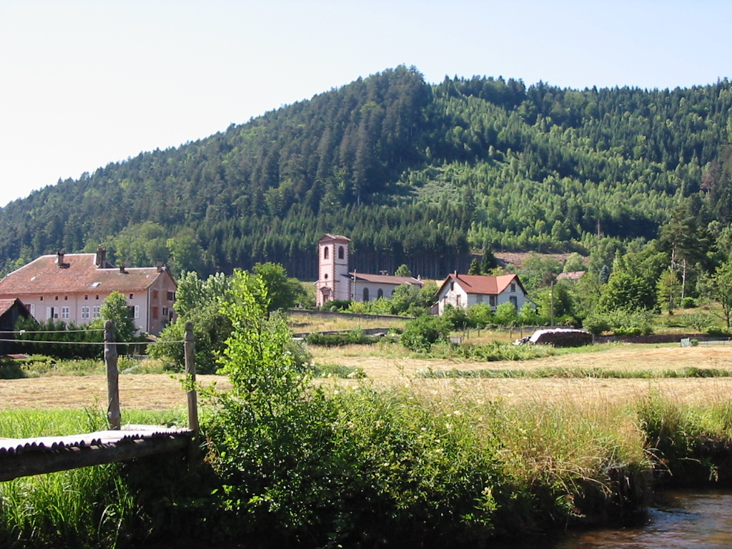 Bionville Commune du canton de Badonviller Photo personnelle du 17 juillet 2006. Copyright © Christian Amet